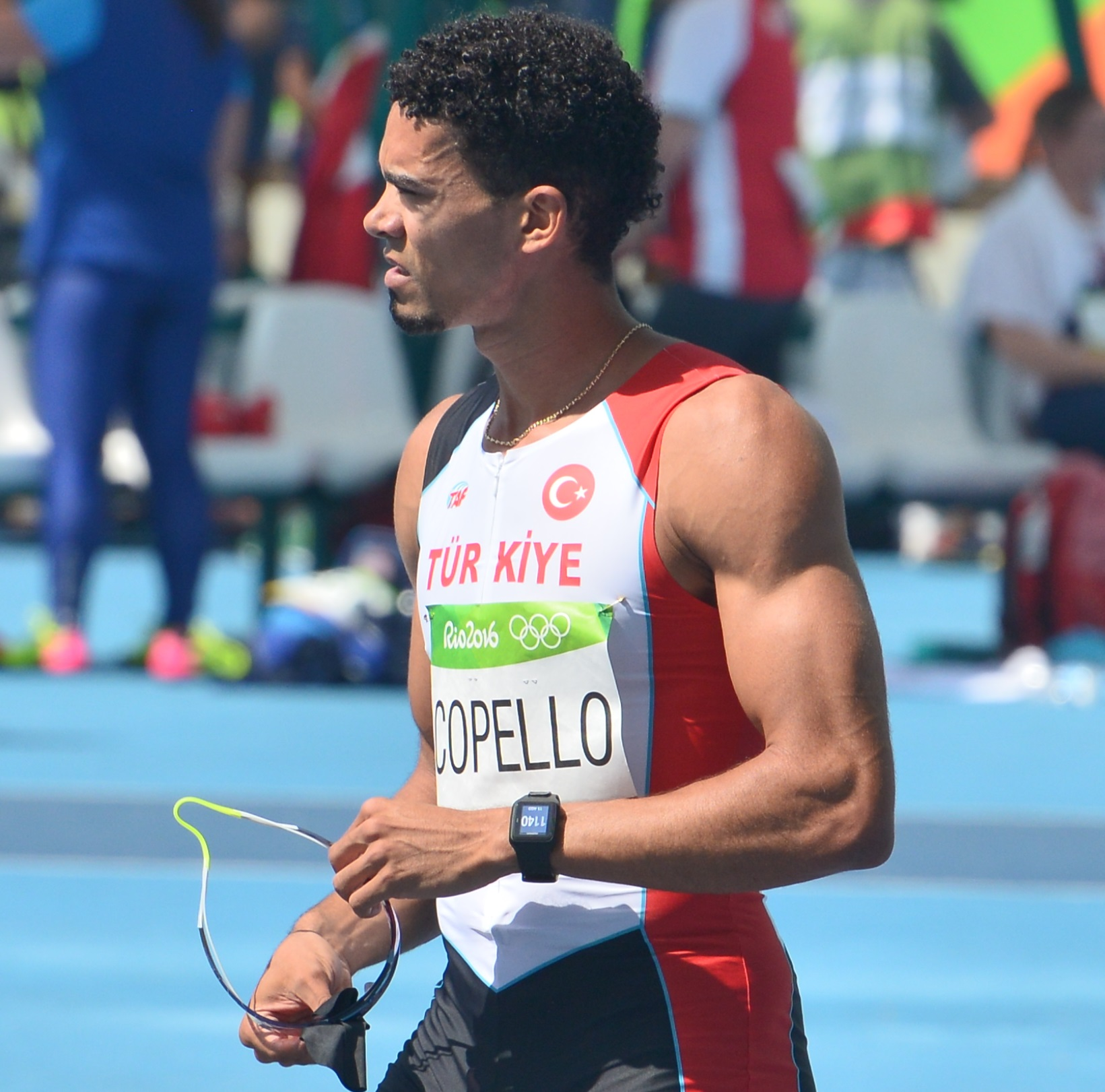 Yasmani Copello lors des séries du 400m haies des jo de Rio